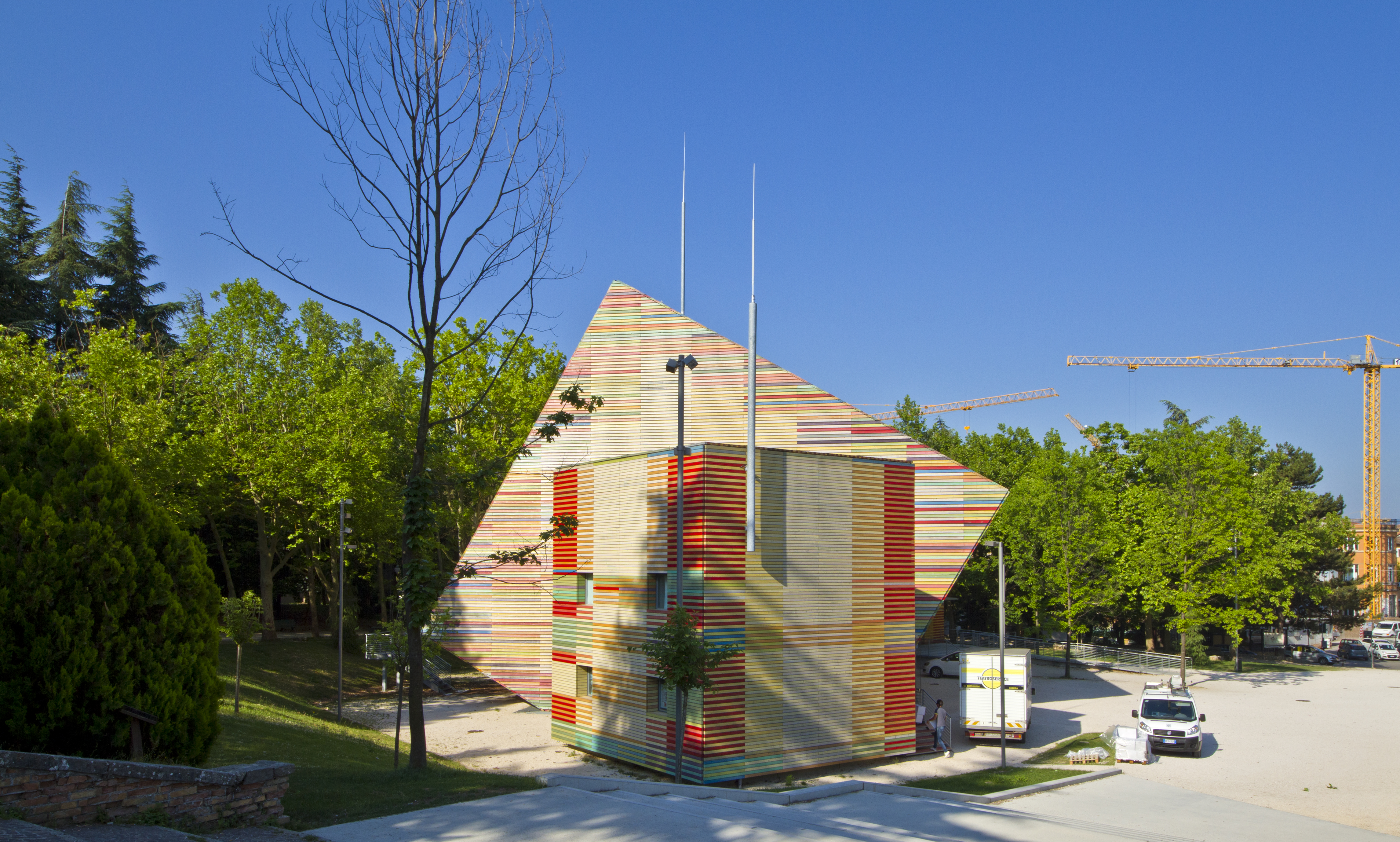 Auditorium del Parco, L'Aquila, Abruzzo, Italy